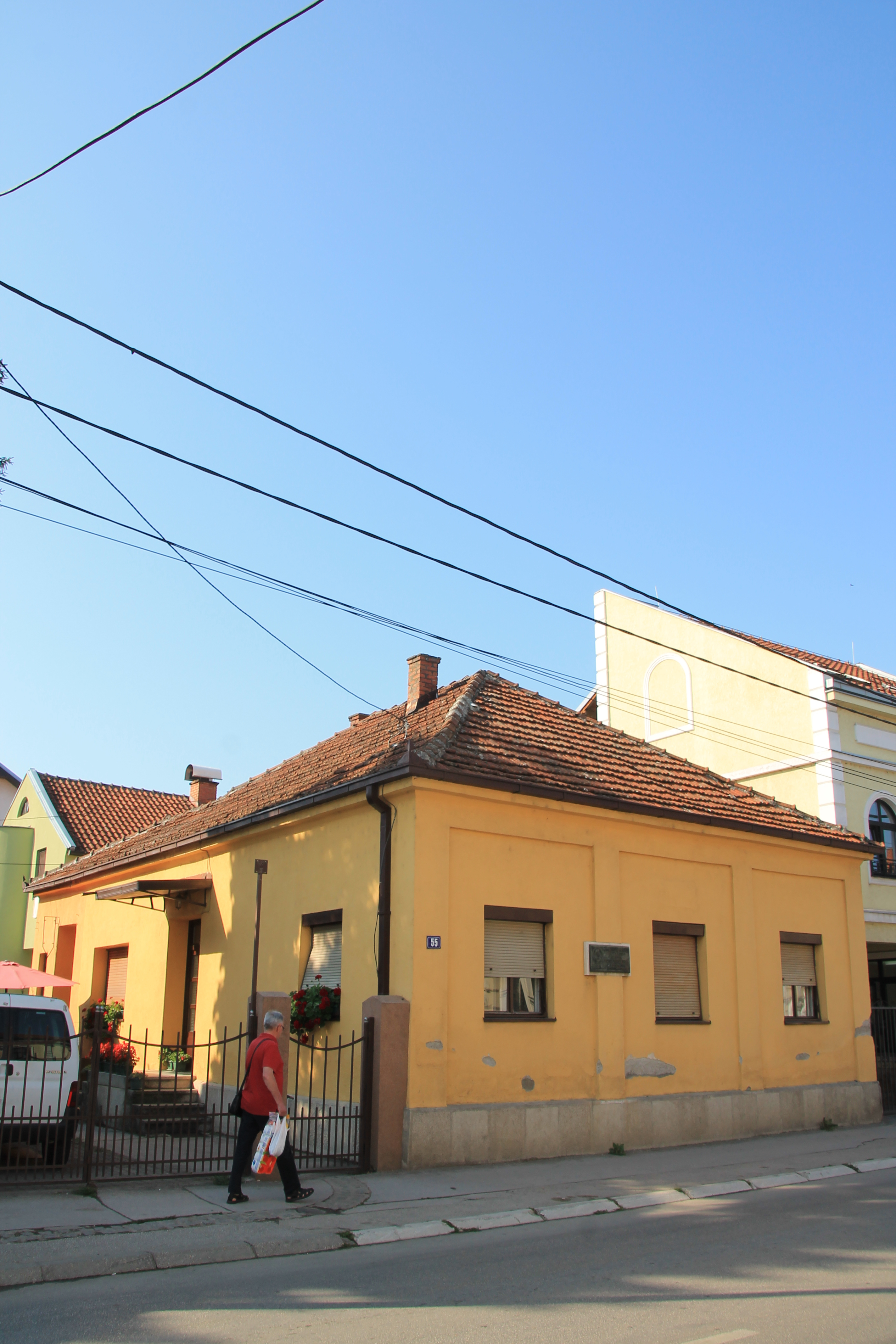 Kuća vojvode Stepe u Čačku